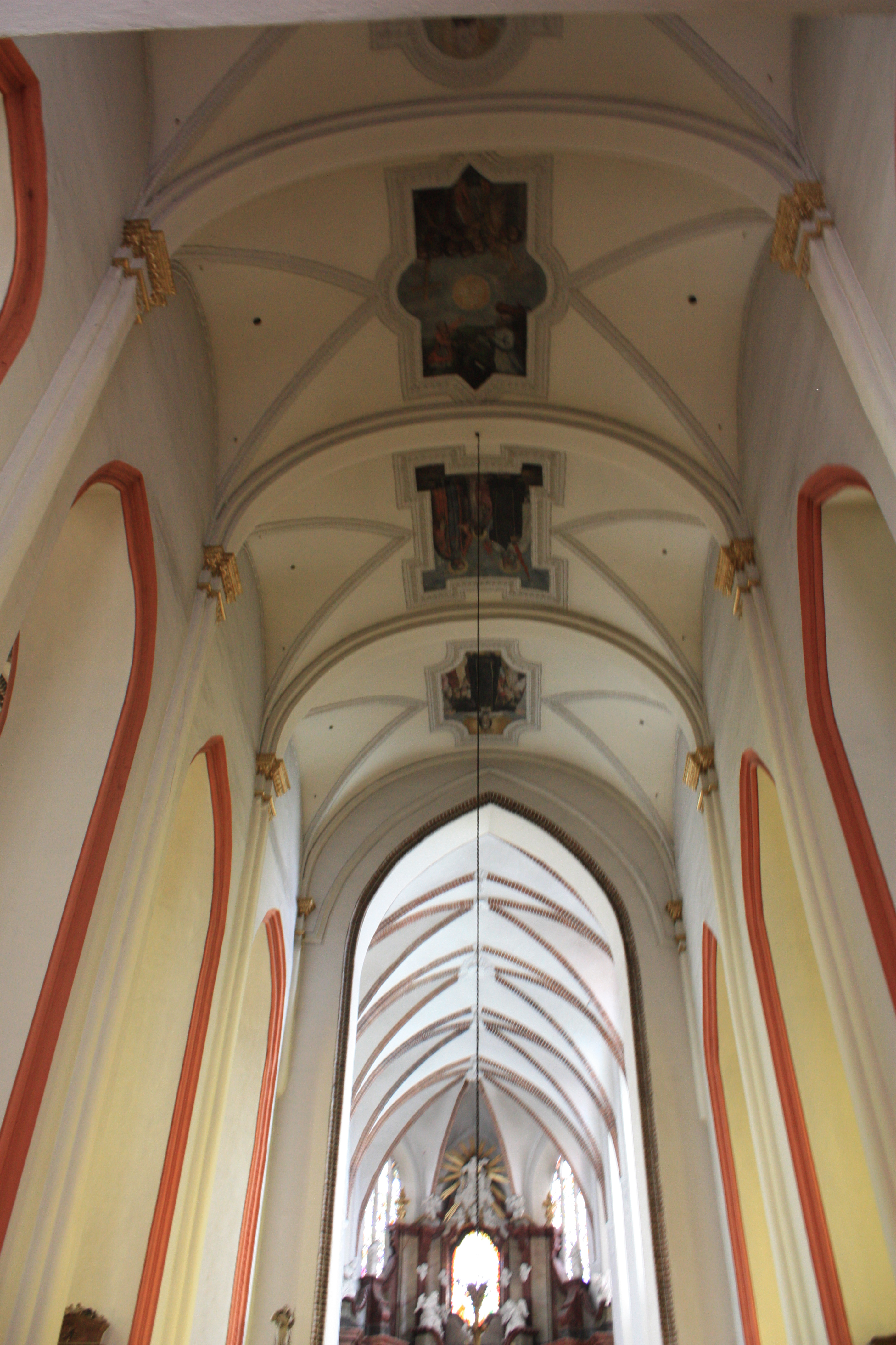 Kościół Bożego Ciała w Poznaniu. Sklepienie nawy głównej.